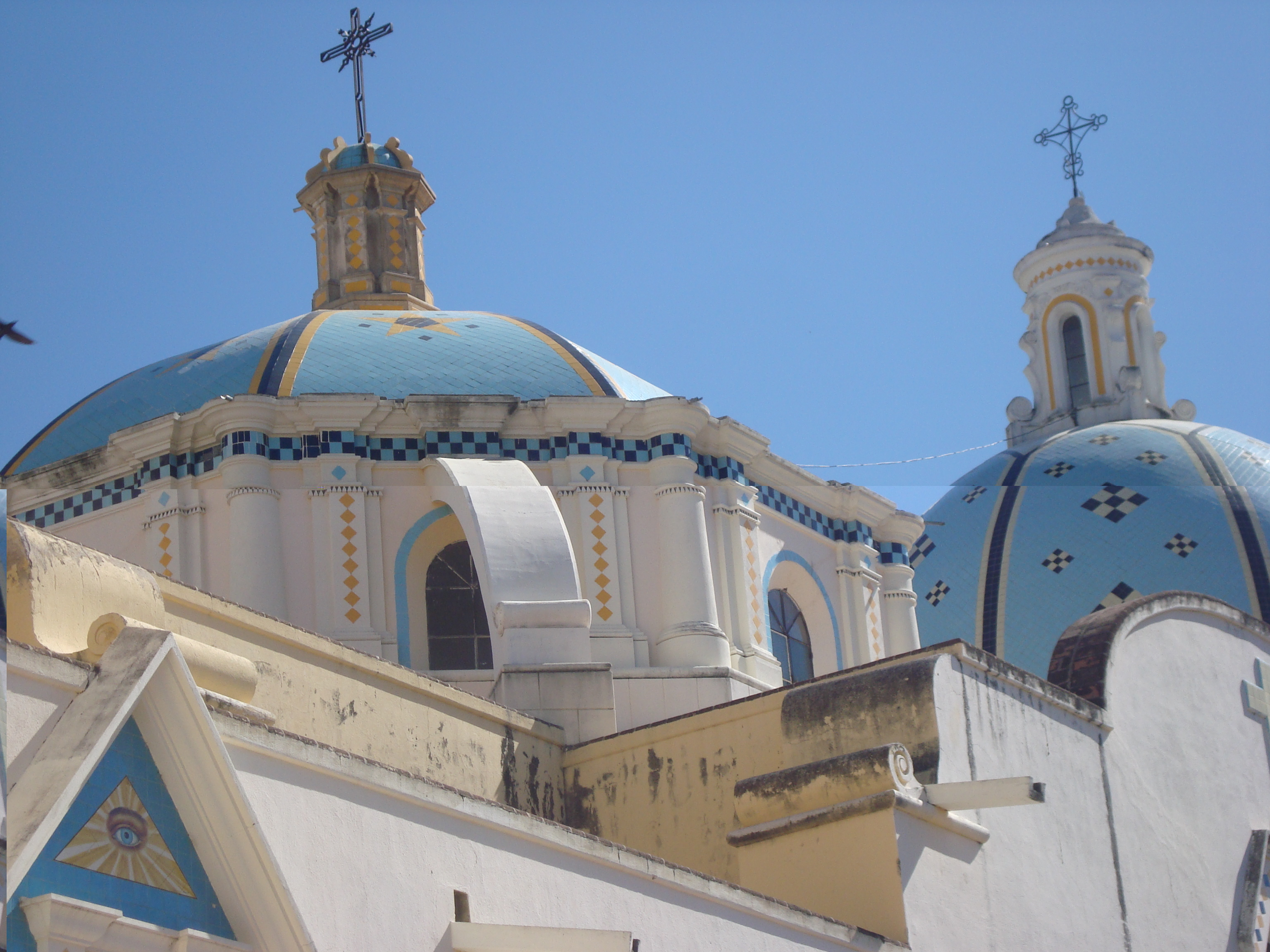 Detalle de las cúpulas del templo de San Juan Bautista de Acatlán (Puebla, México). Fueron construidas en el siglo XVIII y han sido afectadas por varios terremotos, el más reciente ocurrió el 15 de junio de 1999 y agrietó la cúpula y la fachada del templo.